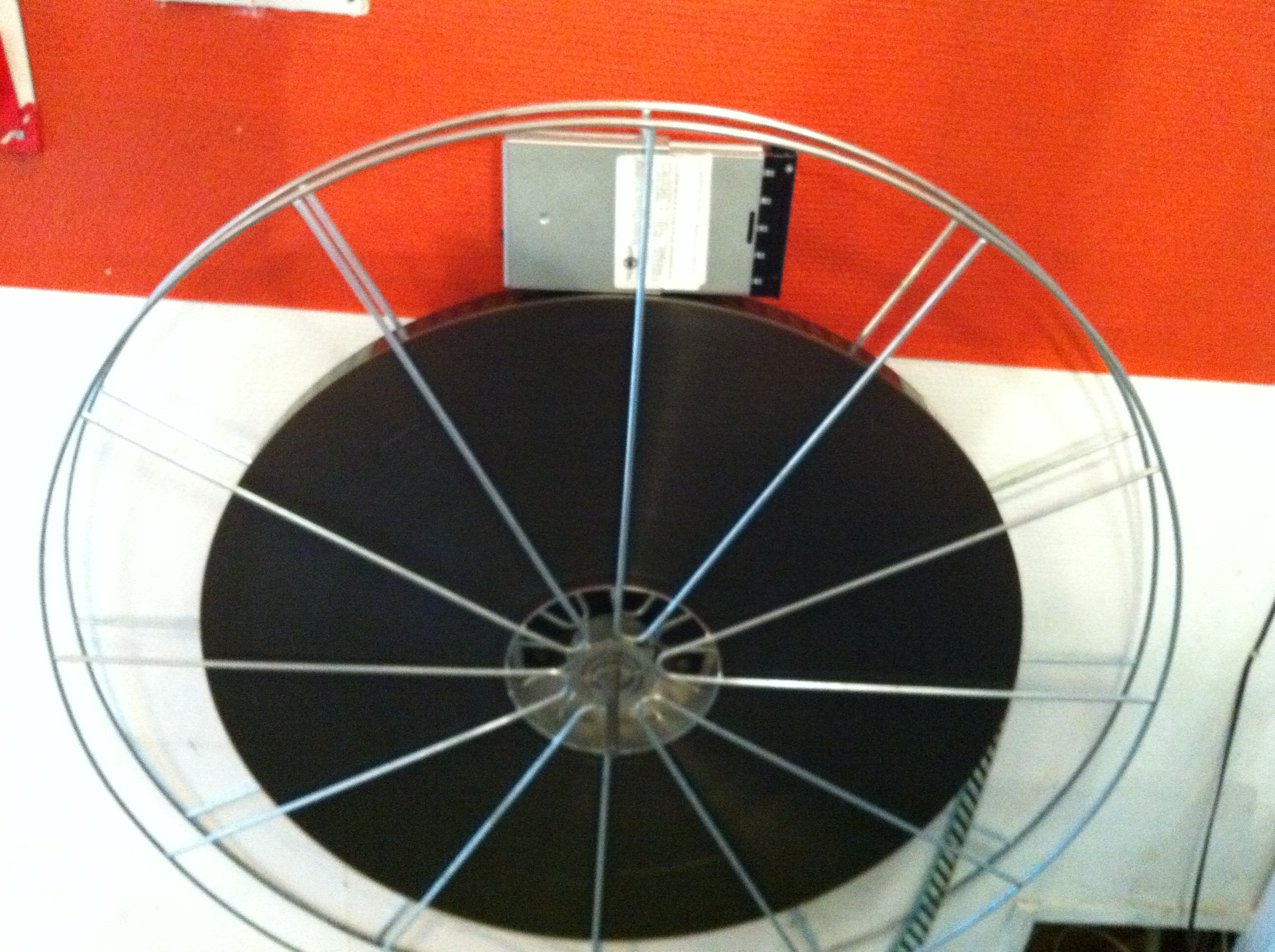 35 mm spole med harddisk ovenpå til sammenligning